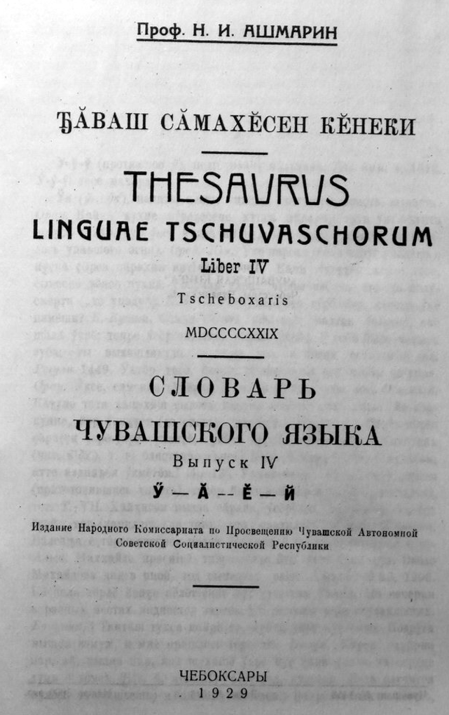 Чӑвашла: Чӑваш сӑмахӗсен кӗнеки